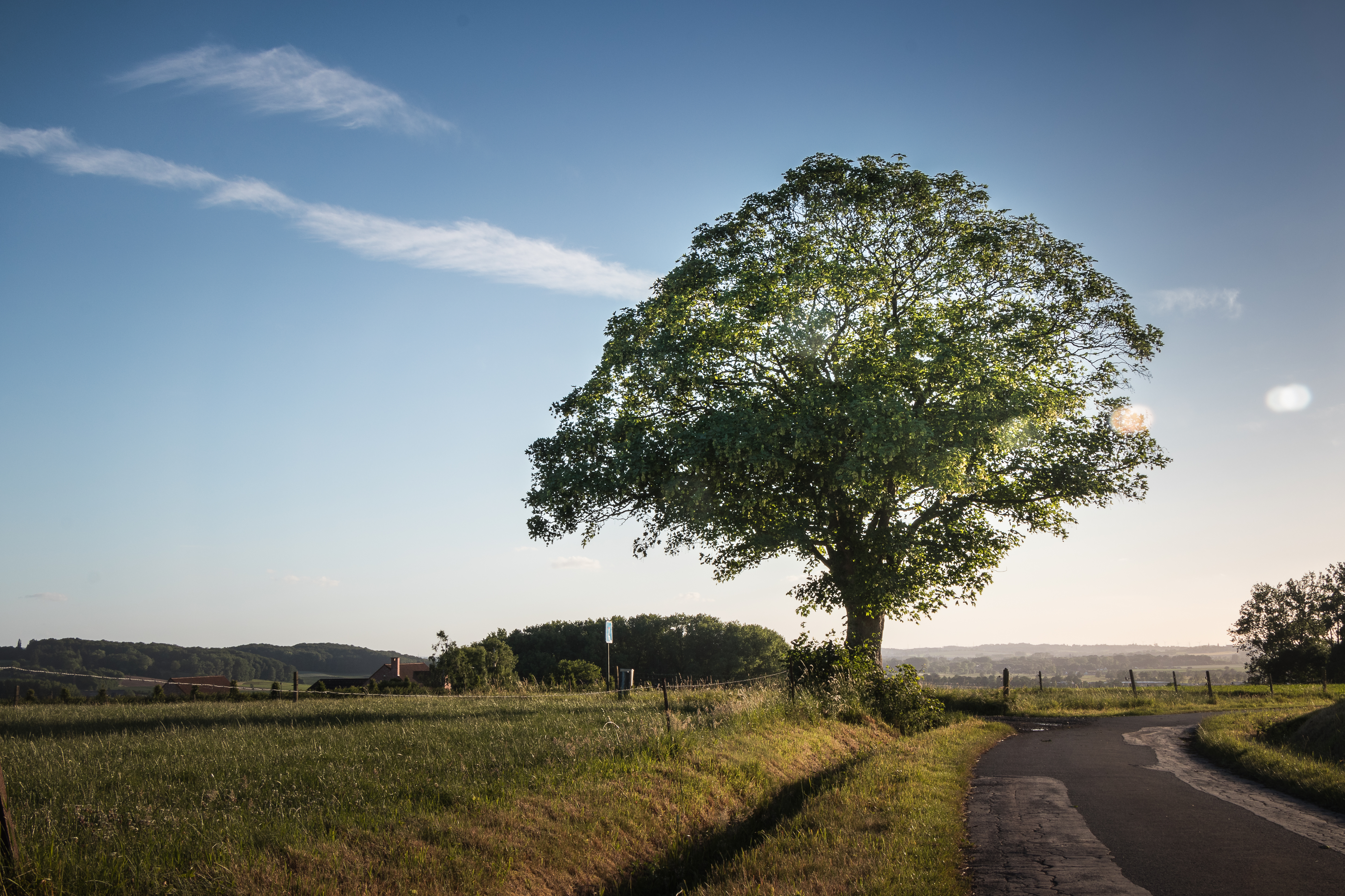 Vlaamse Ardennen - Leupegem : deze (berg)esdoorn staat op de kruising van twee landwegen op een heuvel in de Scheldevallei. Sinds de 17de eeuw werd op deze plek reeds melding gemaakt van een boom ; 'de Ommelozen boom'. Een boom met een verhaal die door velen zeer geliefd is en veelvuldig wordt gefotografeerd. This photo of immovable heritage has been taken in the Flemish Region